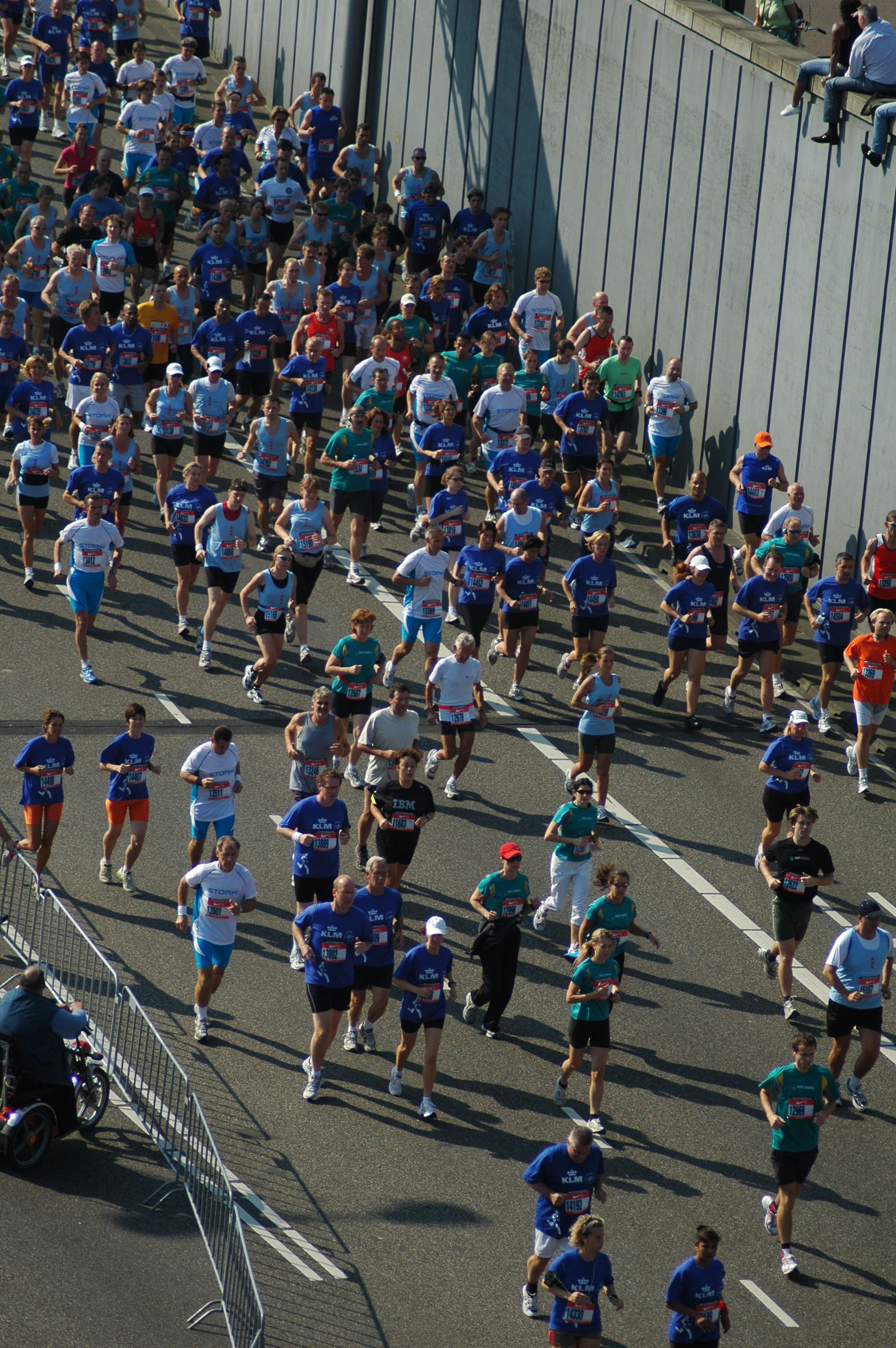 Netherlands, Amsterdam - Dam-tot-Damloop runners before IJtunnel.